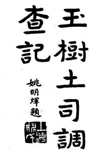 中文（台灣）: 玉樹調查記原封面